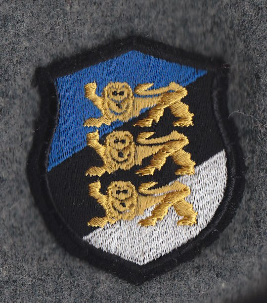 Нарукавная эмблема эстонских добровольцев